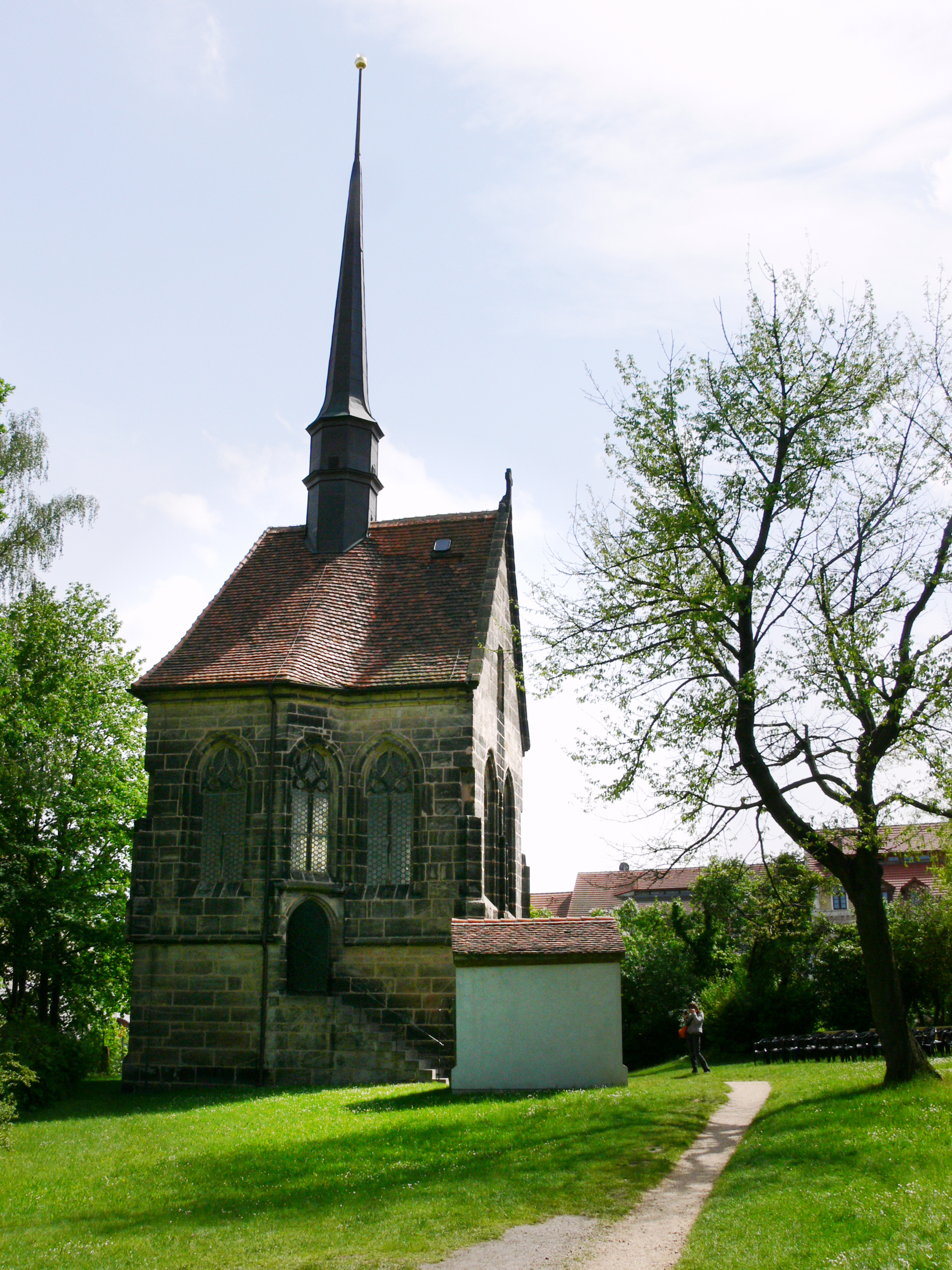 Heilig-Kreuz-Kapelle, Heiliges Grab, Görlitz